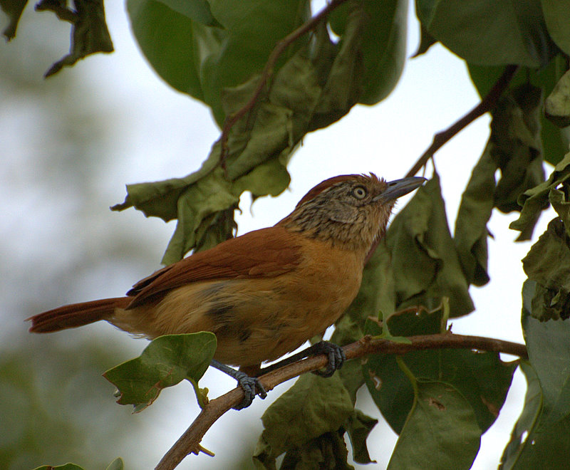 Female Barred Antshrike No quintal da casa dos meus pais na cidade de Piraju-SP